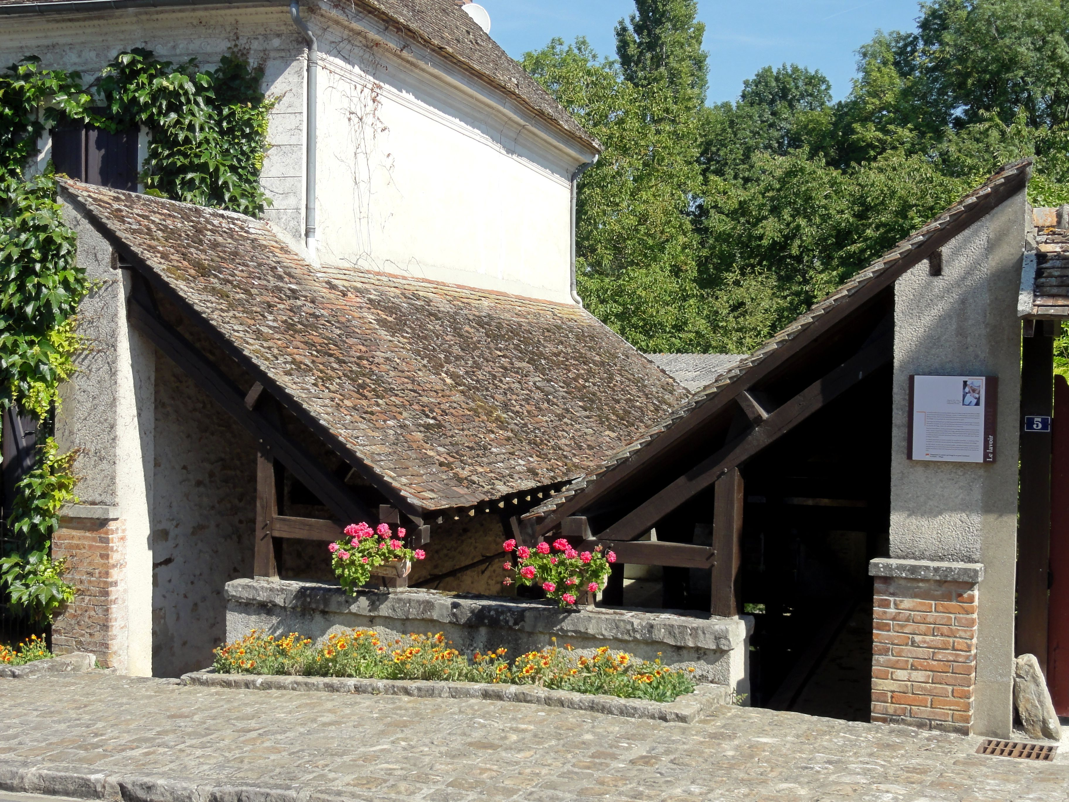 Lavoir.